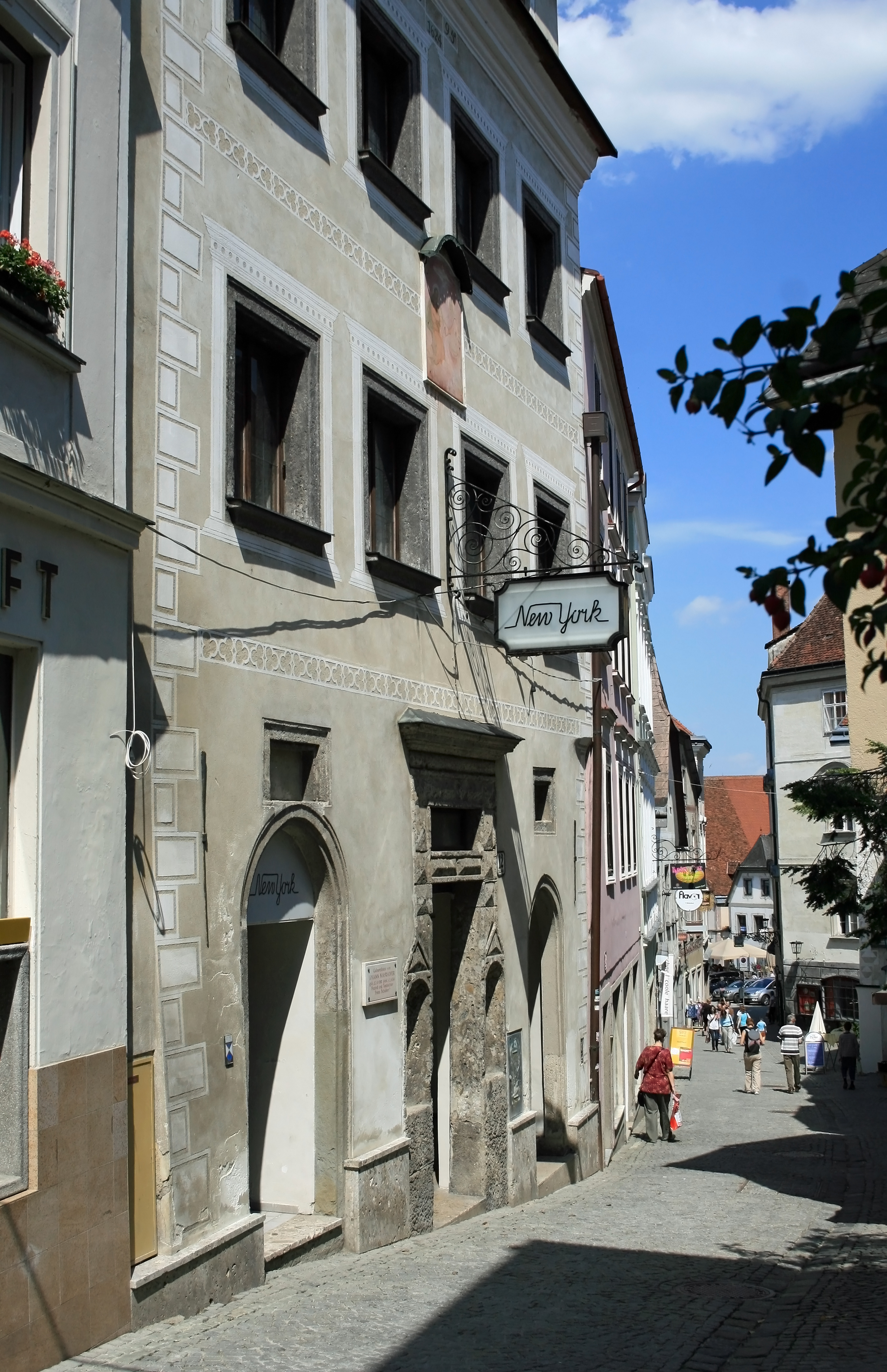 Johann Mayrhofers Geburtshaus in der Steyrer Pfarrgasse 12